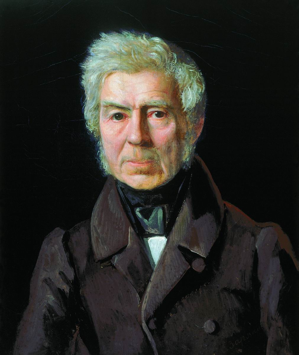 Зарянко Сергей Константинович Портрет А.Г. Венецианова Ивановское объединение историко-революционных музеев